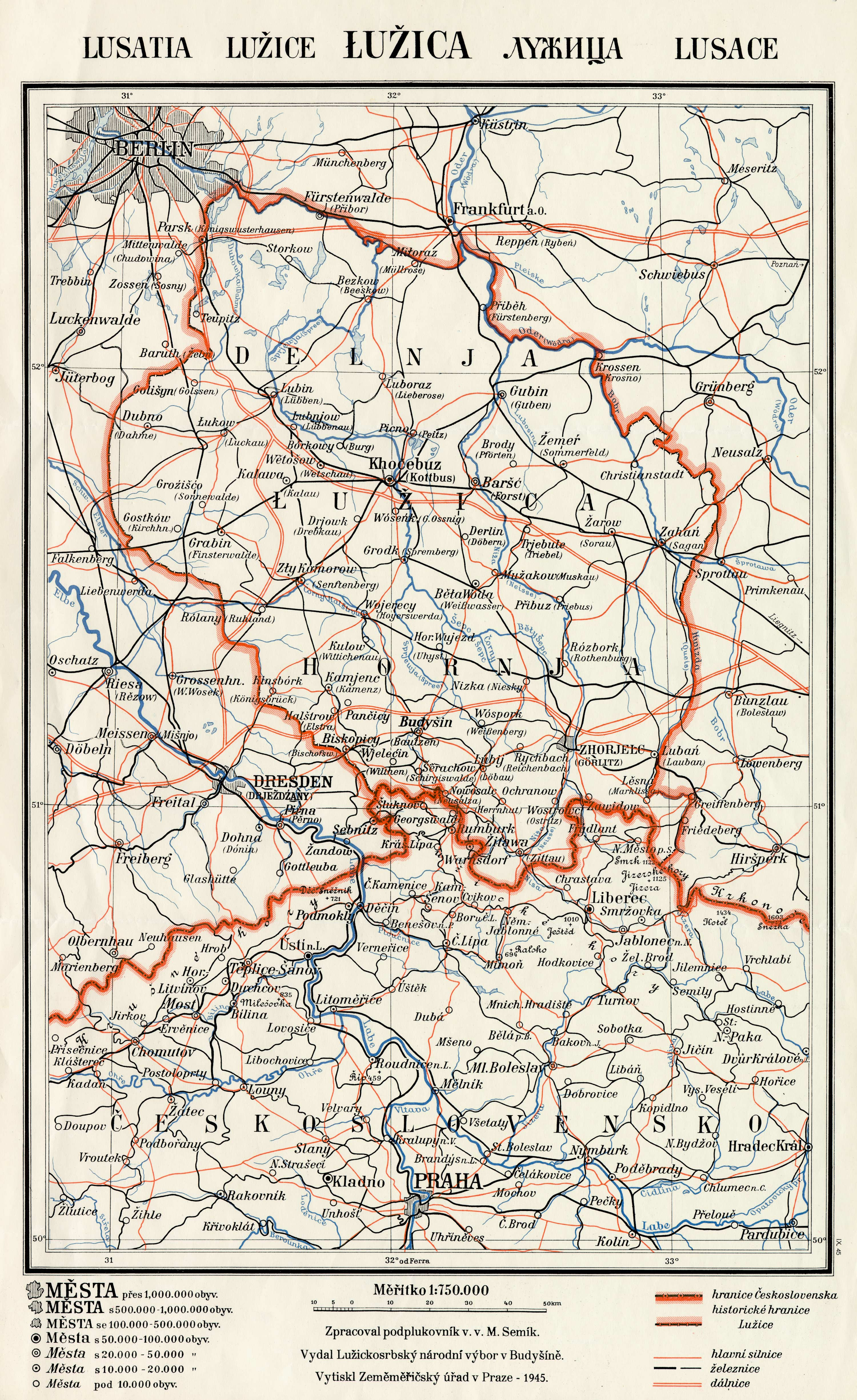 Mapa historické Lužice. Zpracoval podplukovník M. Semík, vydal Lužickosrbský národní výbor v Budyšíně